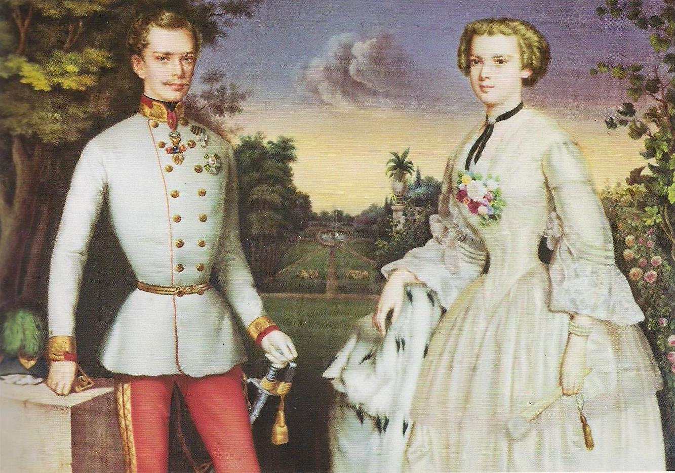 Miniatura di porcellana di manifattura viennese, raffigurante Francesco Giuseppe e Elisabetta all'epoca del loro fidanzamento.